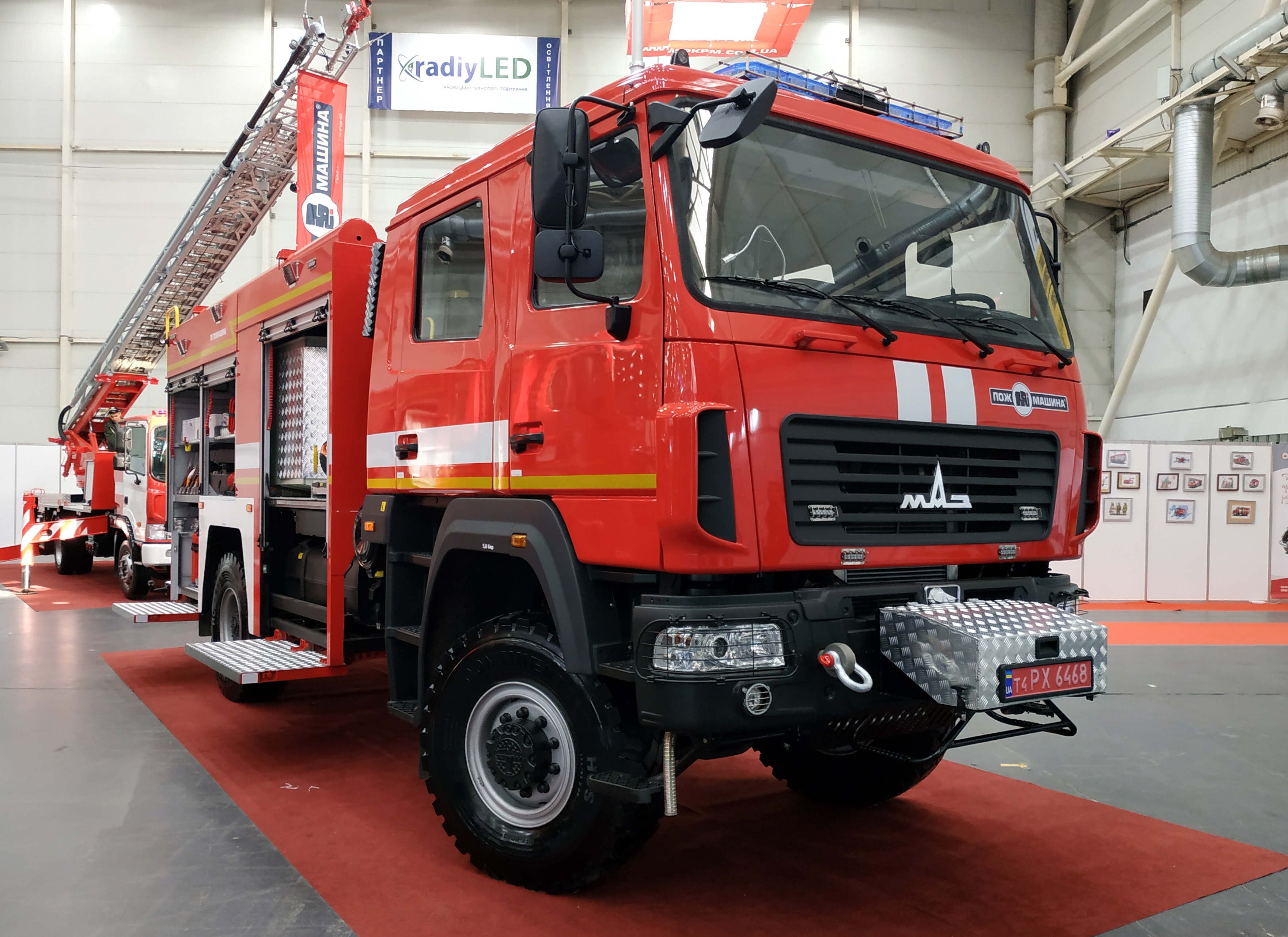 Автоцистерна пожарная АЦ-4-60 (530927)-515М на шасси МАЗ-530927 4х4 в экспозиции завода "Пожмашина". Выставка "Зброя та безпека", Киев, октябрь 2019 г.